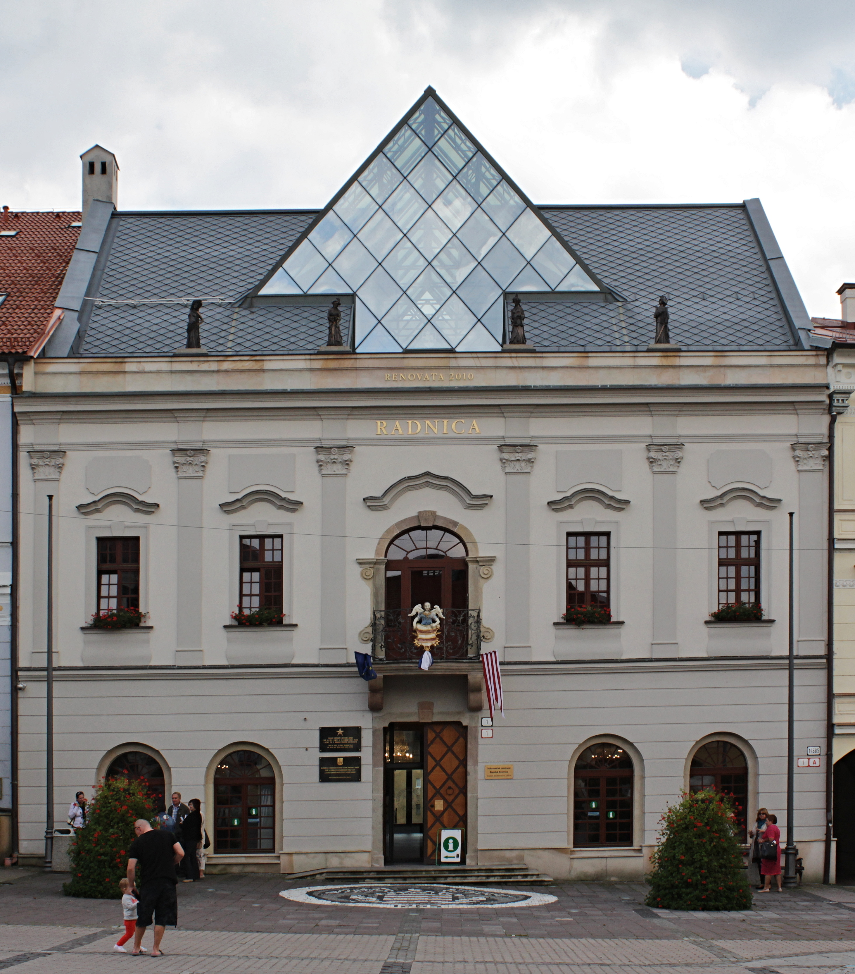 Námestie SNP 1 v Banskej Bystrici - dom V Mühlsteina